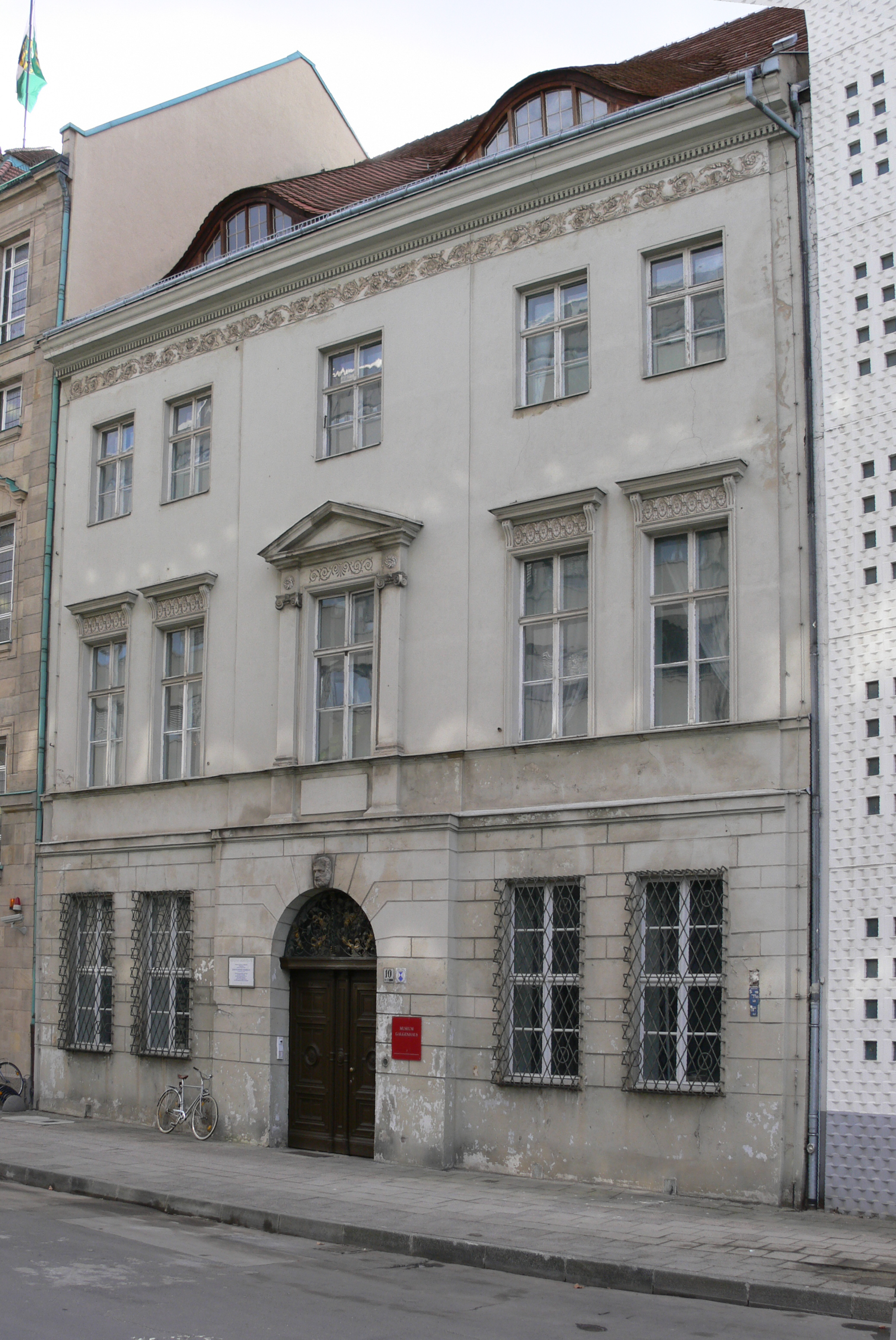 Museum Galgenhaus, Brüderstraße, 11078 Berlin-Mitte